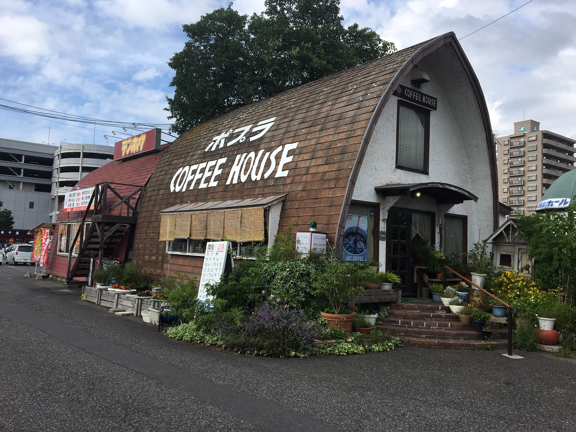 長野県松本市のカナディアンシーダーハウスの喫茶店、「ポプラ COFFEE HOUSE」。背後には、同じくカナディアンシーダーハウスのラーメン店「テンホウ」が背中合わせで建っている。